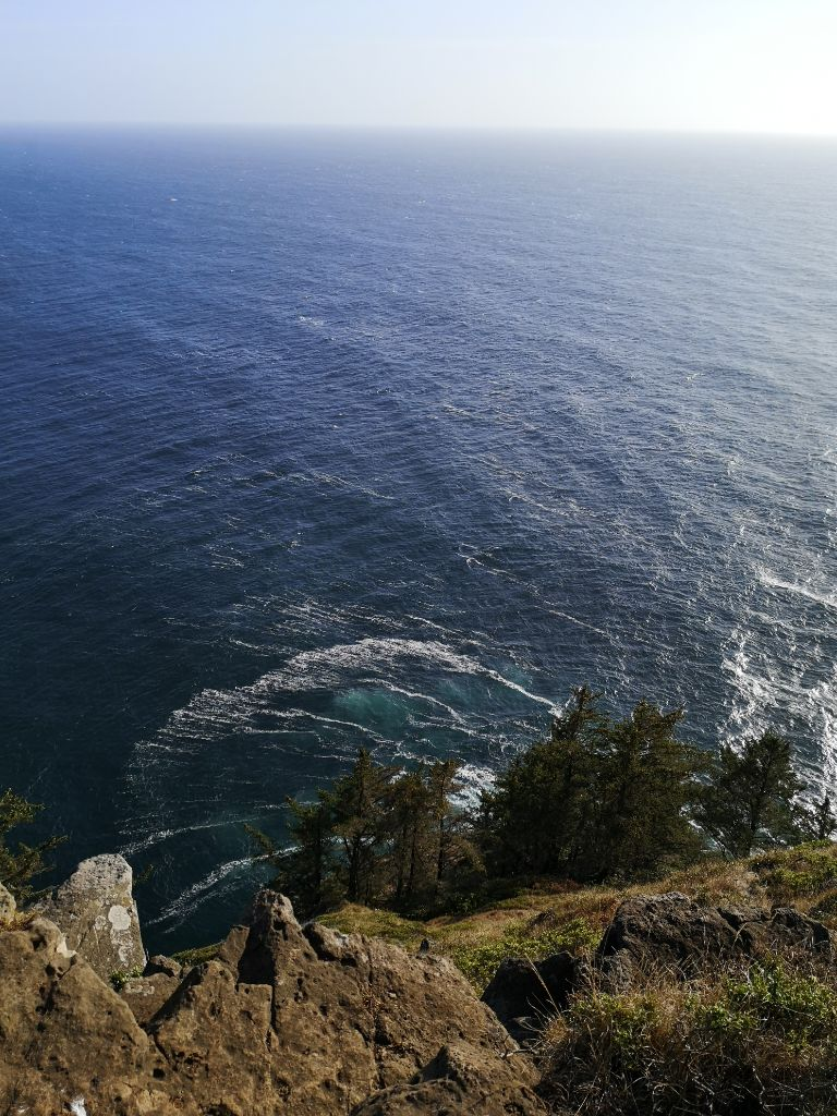 Steilküste